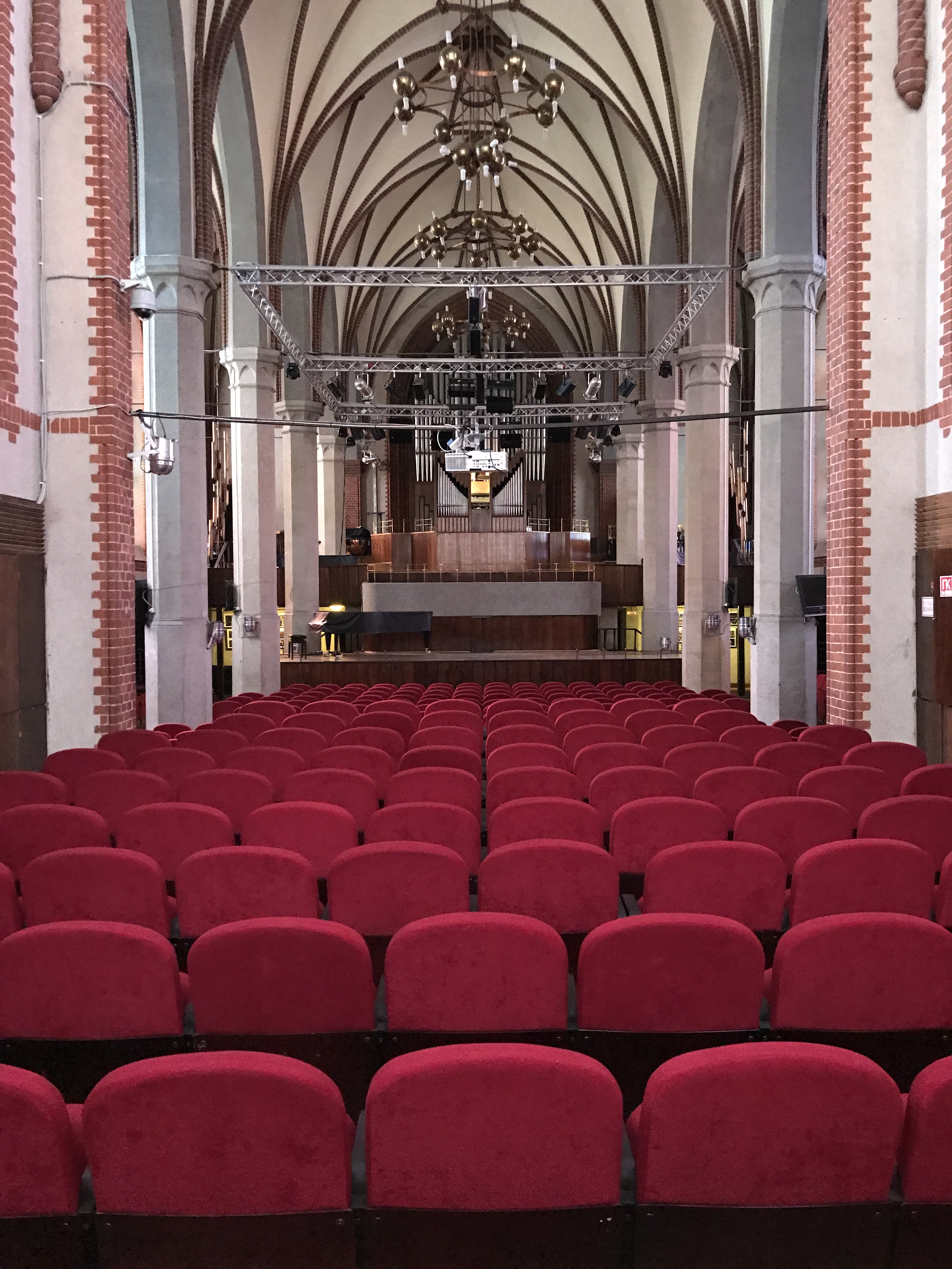 Кирха: улица Богдана Хмельницкого, 63-а, Калининград, Калининградская область